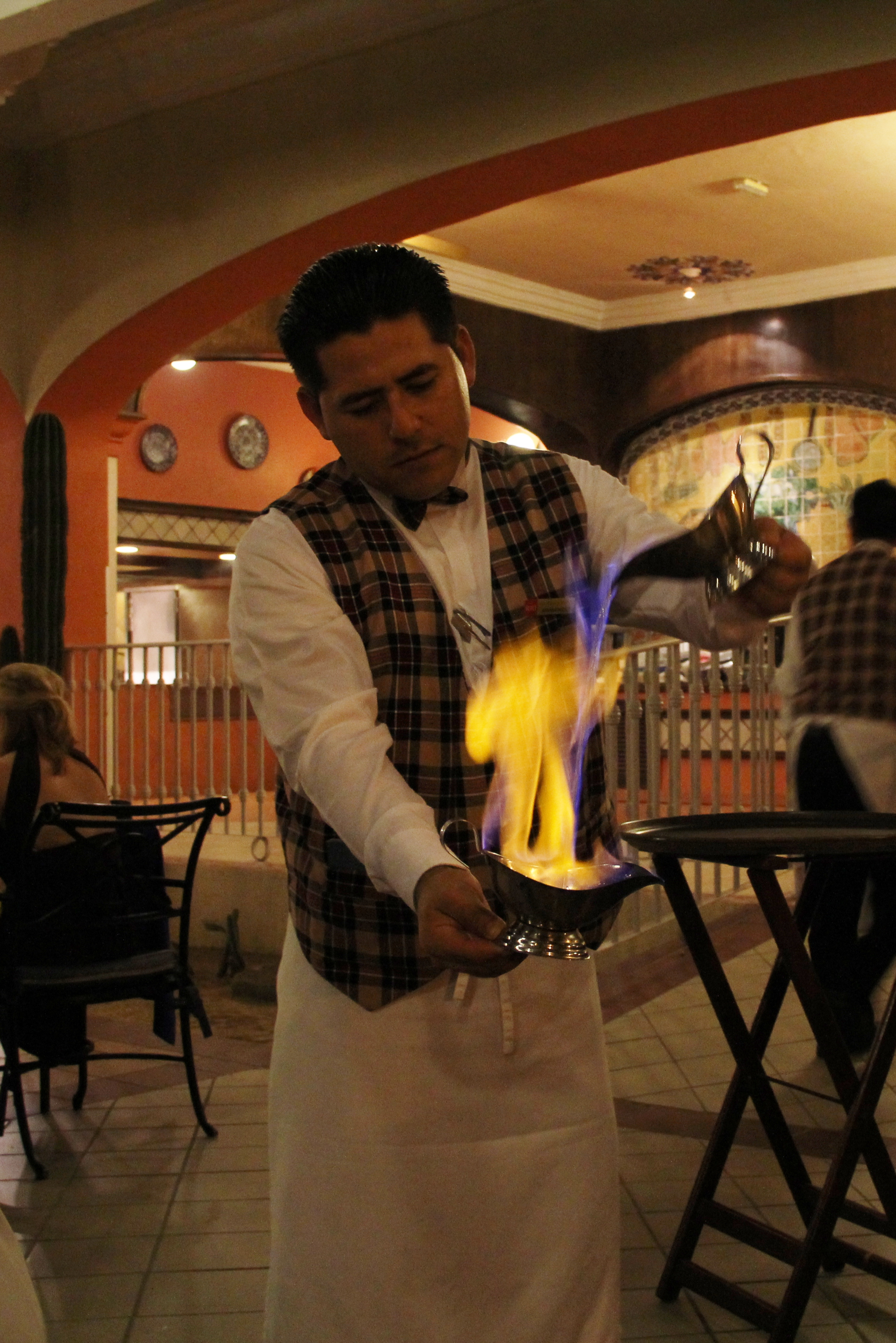 Flambeed